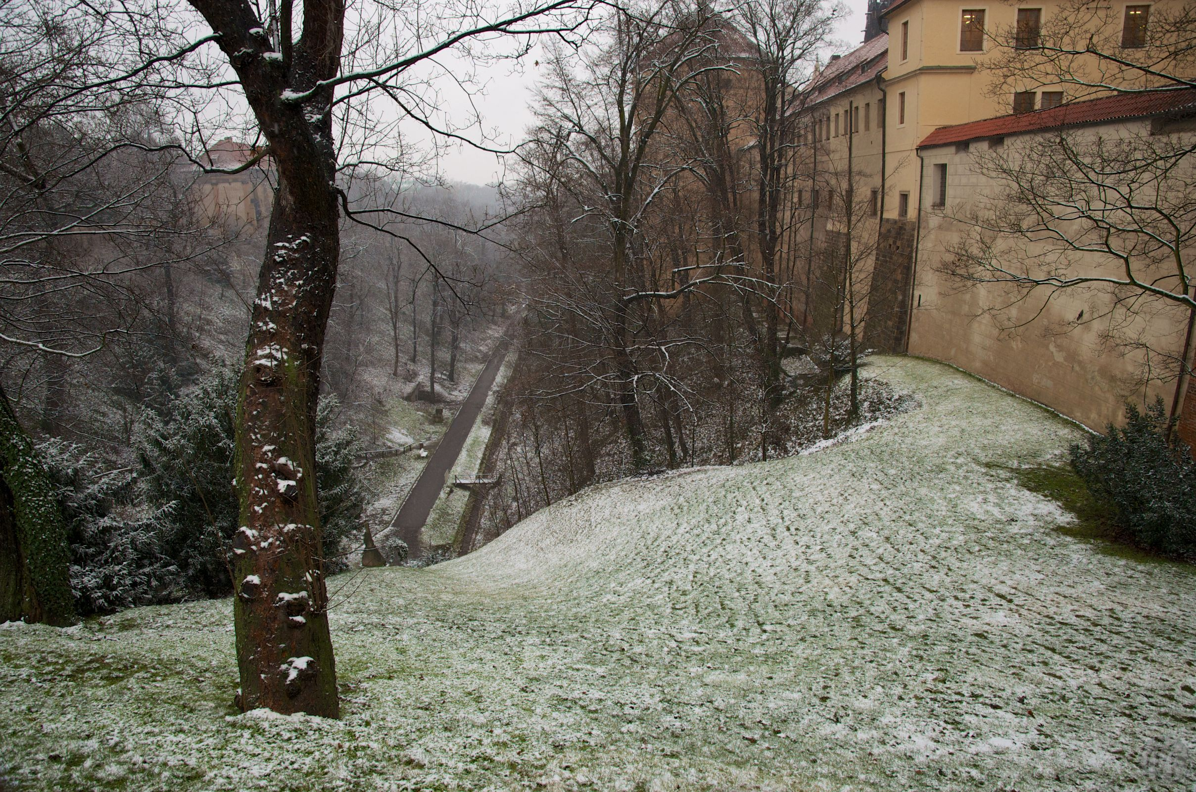 Dolní Jelení příkop v zimě, pohled z Prašného mostu. Vlevo Míčovna, uprostřed Mihulka, vpravo mincovna.